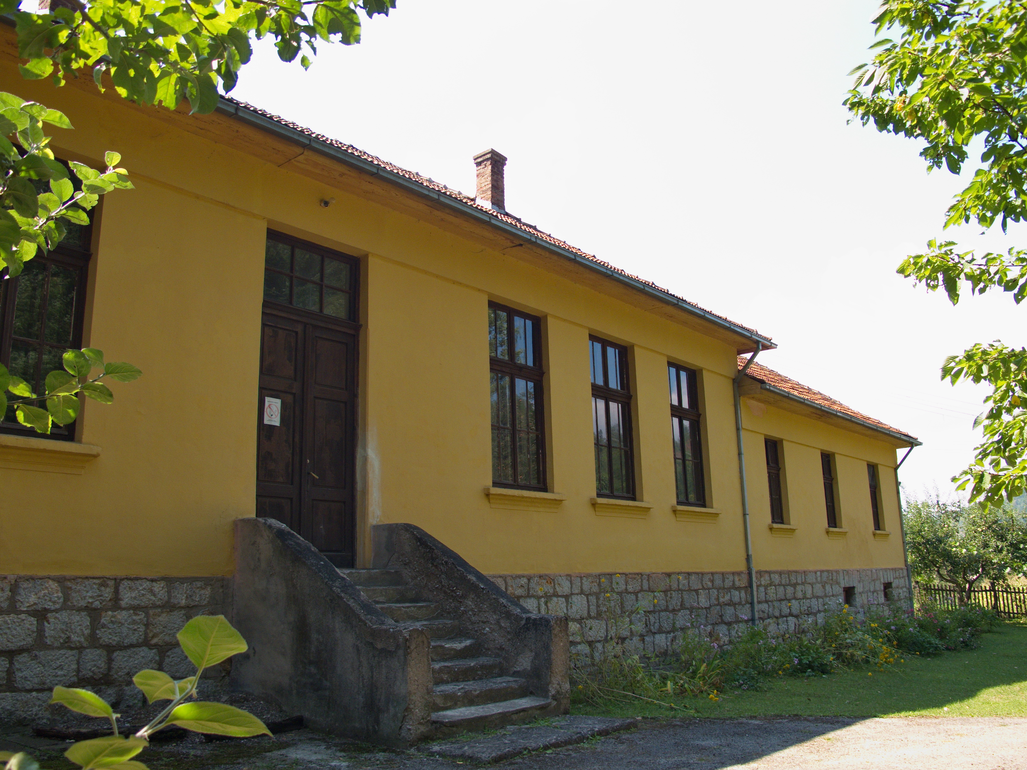 Северово, сеоска основна школа.